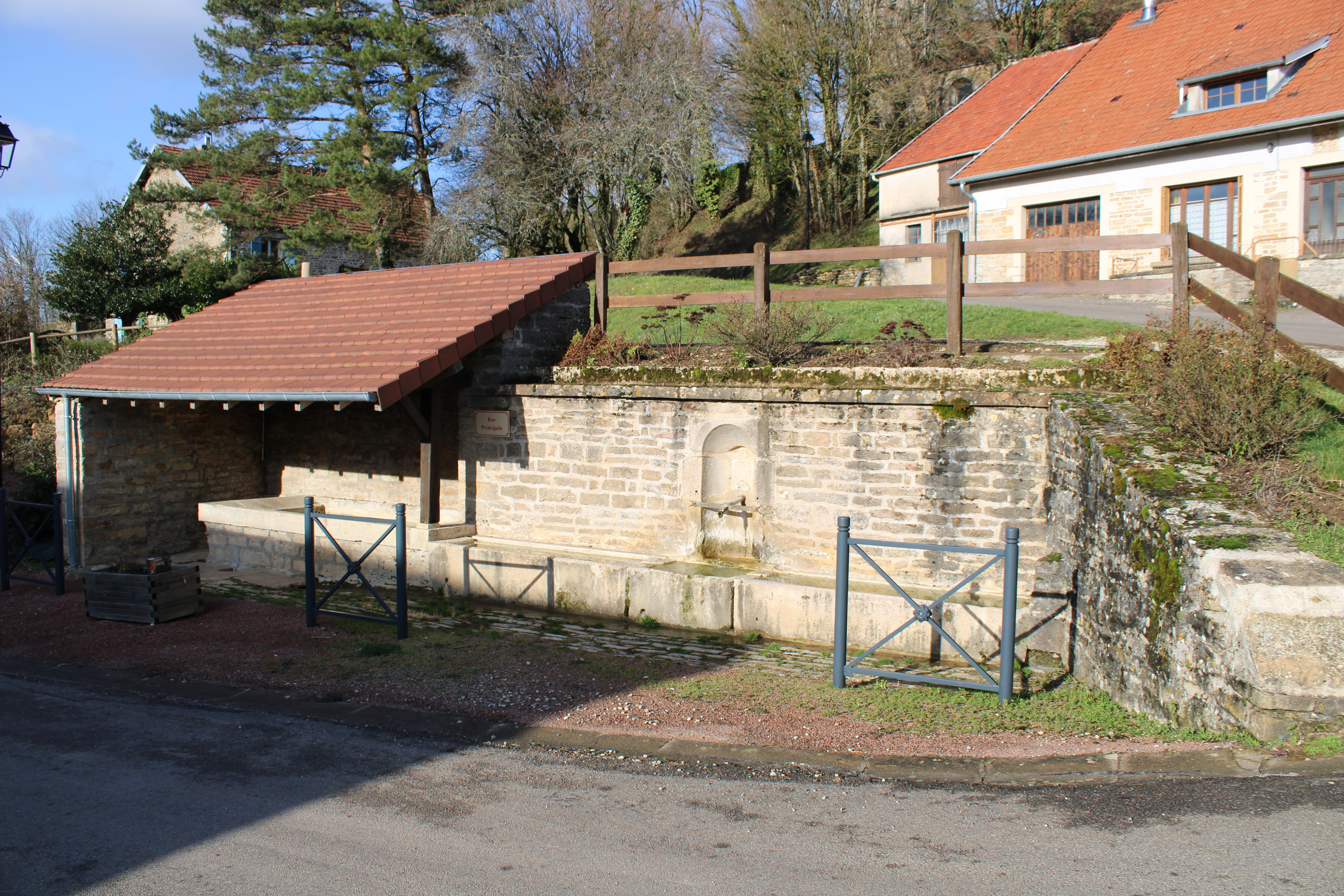 Le lavoir-abeuvoir